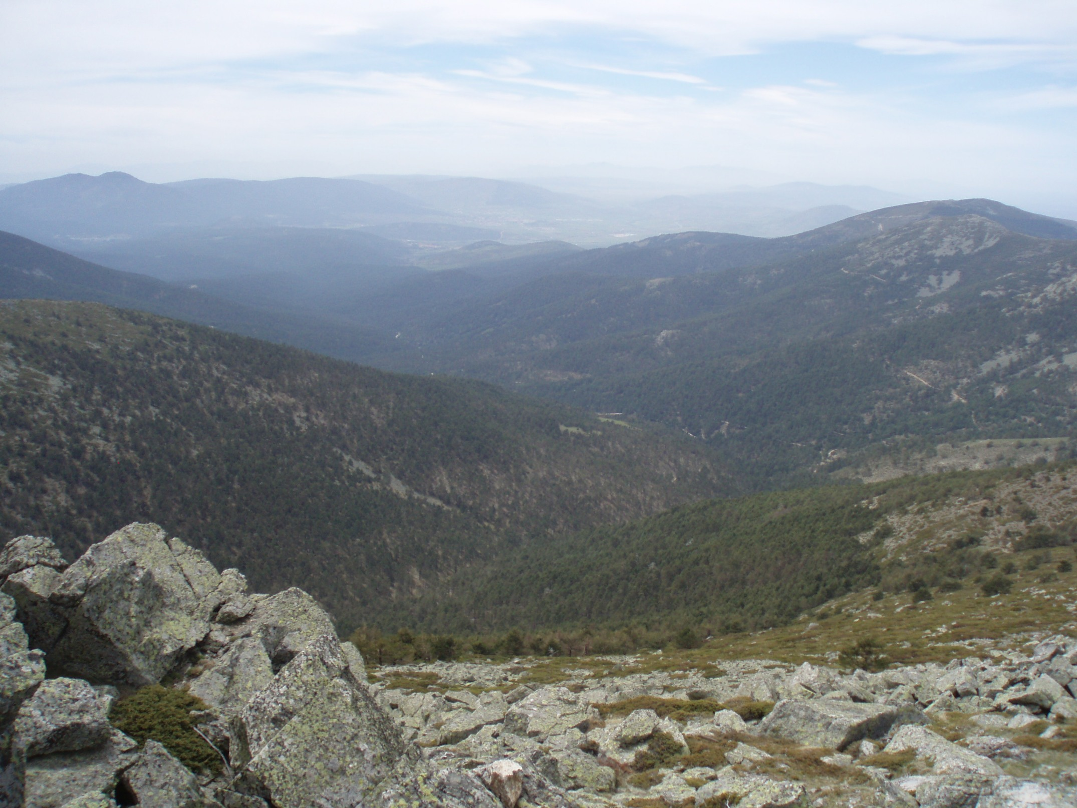 Valle del río Moros visto desde la cima de Montón de Trigo (Sierra de Guadarrama, España).